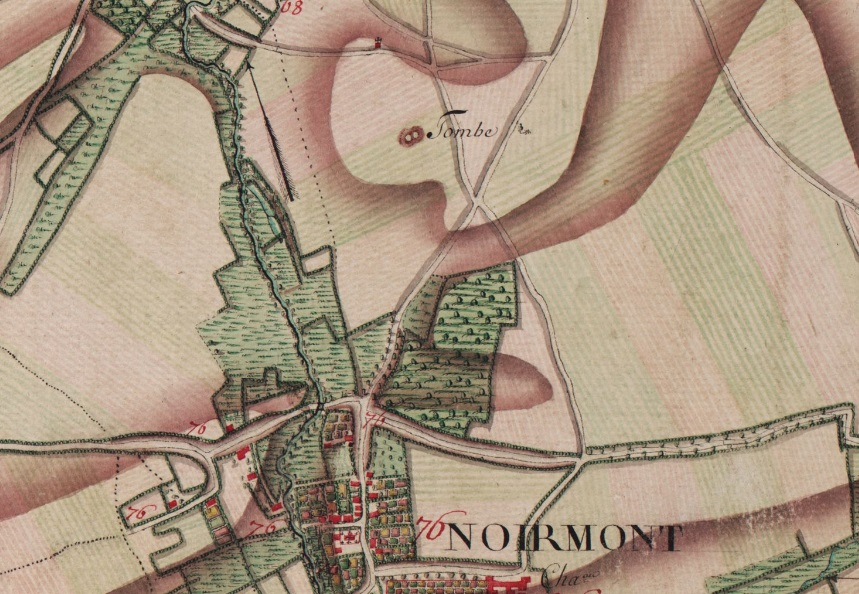 Extrait de la carte de Ferraris n° 96B